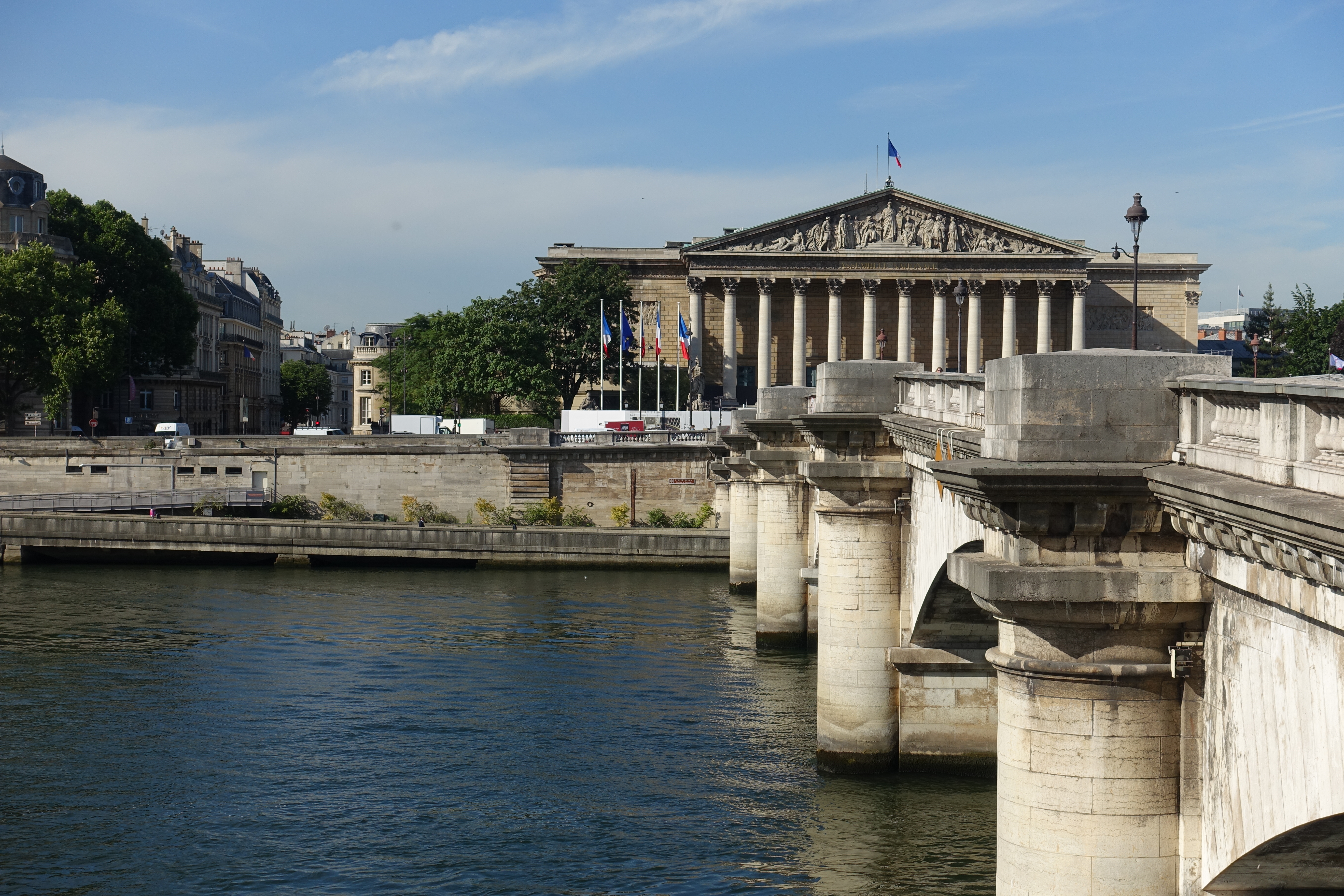 Assemblée Nationale @ Pont de la Concorde @ Paris